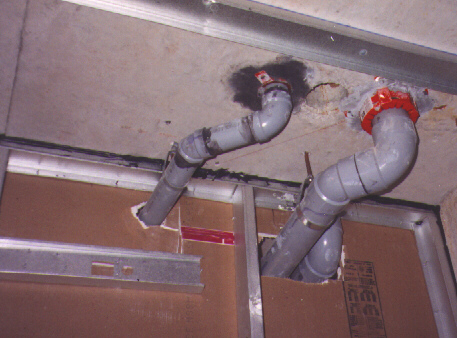 Nortown Casitas in Toronto, Ontario, Kanada: Abschottung mit Brandmanschetten und Brandschutzmörtel, von Plastikrohren in einer Betondecke. Da die Löcher für die Plastikrohre überdimensioniert waren, wurden sie mit dem Mörtel versiegelt. Unter der Betondecke, und wo Platz war INNERHALB der Betondecke, wurden Stahlmanschetten angebracht, die mit intumeszentem Gummi ausgerüstet waren. Das Gummi (3M's FS195) beinhaltet Natriumsilikat Prill, welches bei Feuereinwirkung großen Blähdruck aufweist, um das schmelzende Plastikrohr zuzudrücken. Intumeszenz zusammen mit hohem Expansionsdruck wird ausschließlich für Abschottungen und bestimmte Dichtungen verwendet. Ein sich anbahnendes Problem ist hier auch schon sichtbar, und zwar, die Durchbrüche durch die Gipskartonwand, welche auch eine Brandrate hat. Keinerlei Vorkehrungen für die sachgerechte Anordnung und Versiegelung des Durchbruches wurden hier getroffen. Der Installateur überließ die Abschottung dem Innenausbau, da seine Rohre VOR der Gipskartonwand dort waren. In der Ausschreibung für den Innenausbau stand nichts über die Abschottungen, also bestand später die Abschottung für die Plastikrohrdurchbrüche aus dürftig eingearbeitetem Gips. Eine abgehängte Decke verbarg später alles.